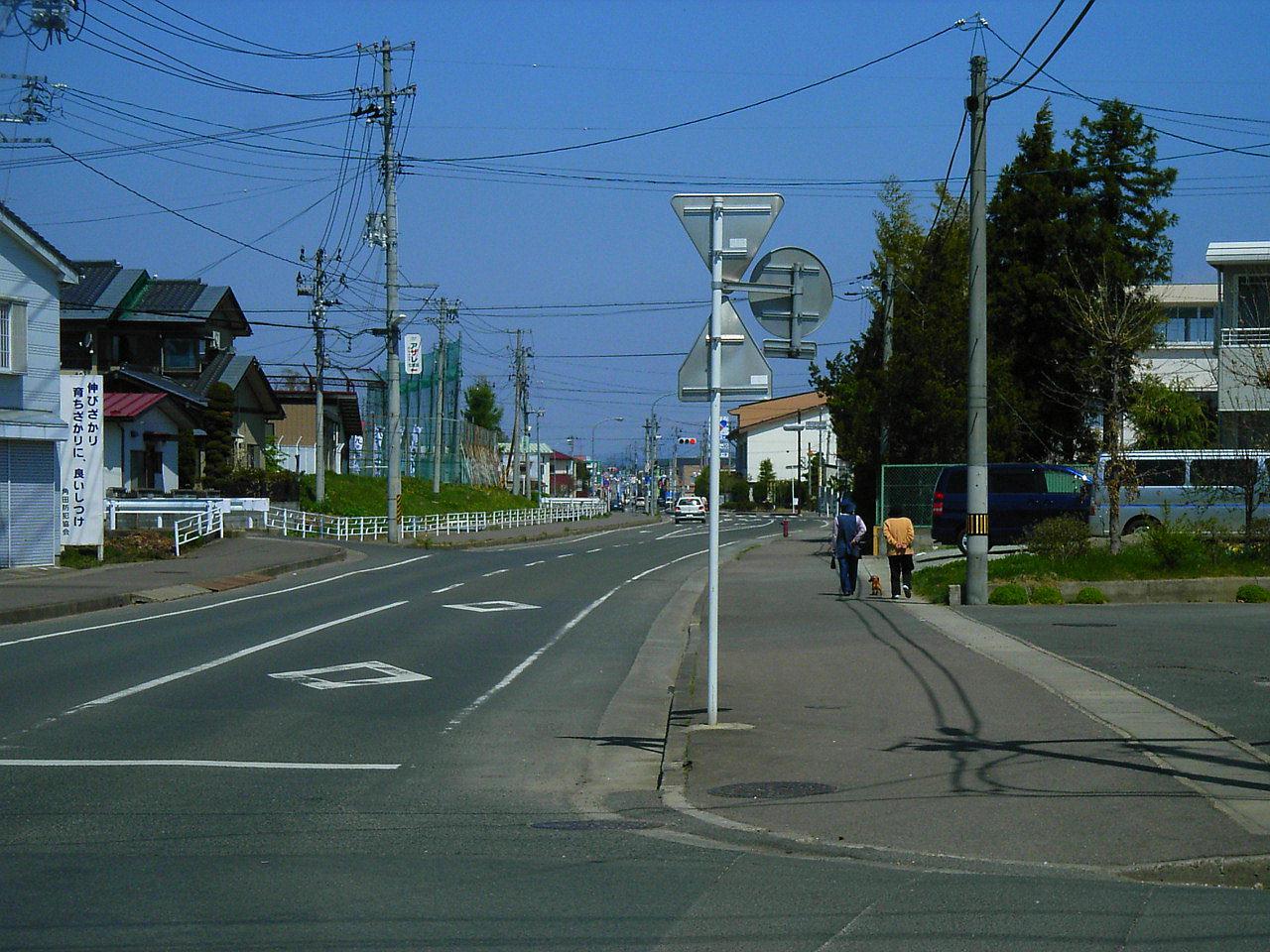 Miyagi Prefectural Road 105, Kosugo-Kakuda Line. Kakuda, Miyagi prefecture, Japan.